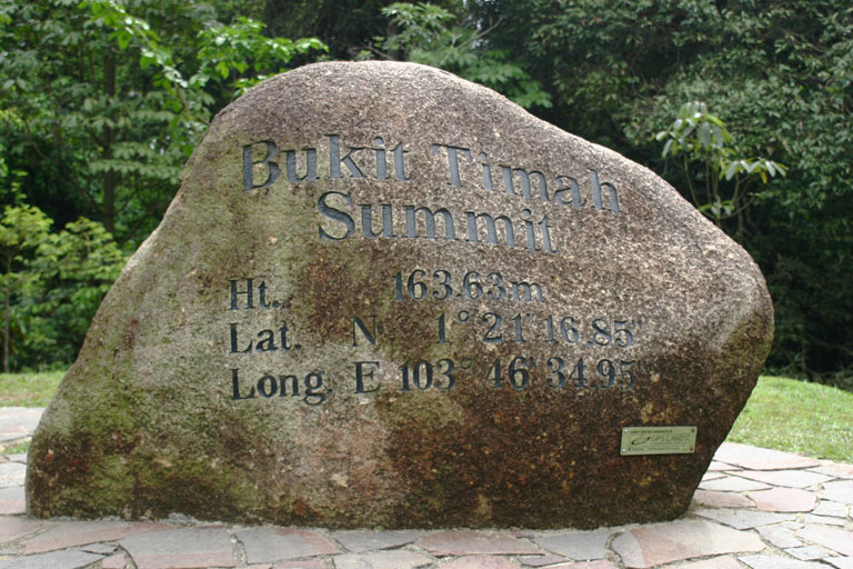 Taken on the summit of Bukit Timah, Singapore by the author. usada no 3 d fertambangan timah d daerah asia n sumatra/atas nama wahid.